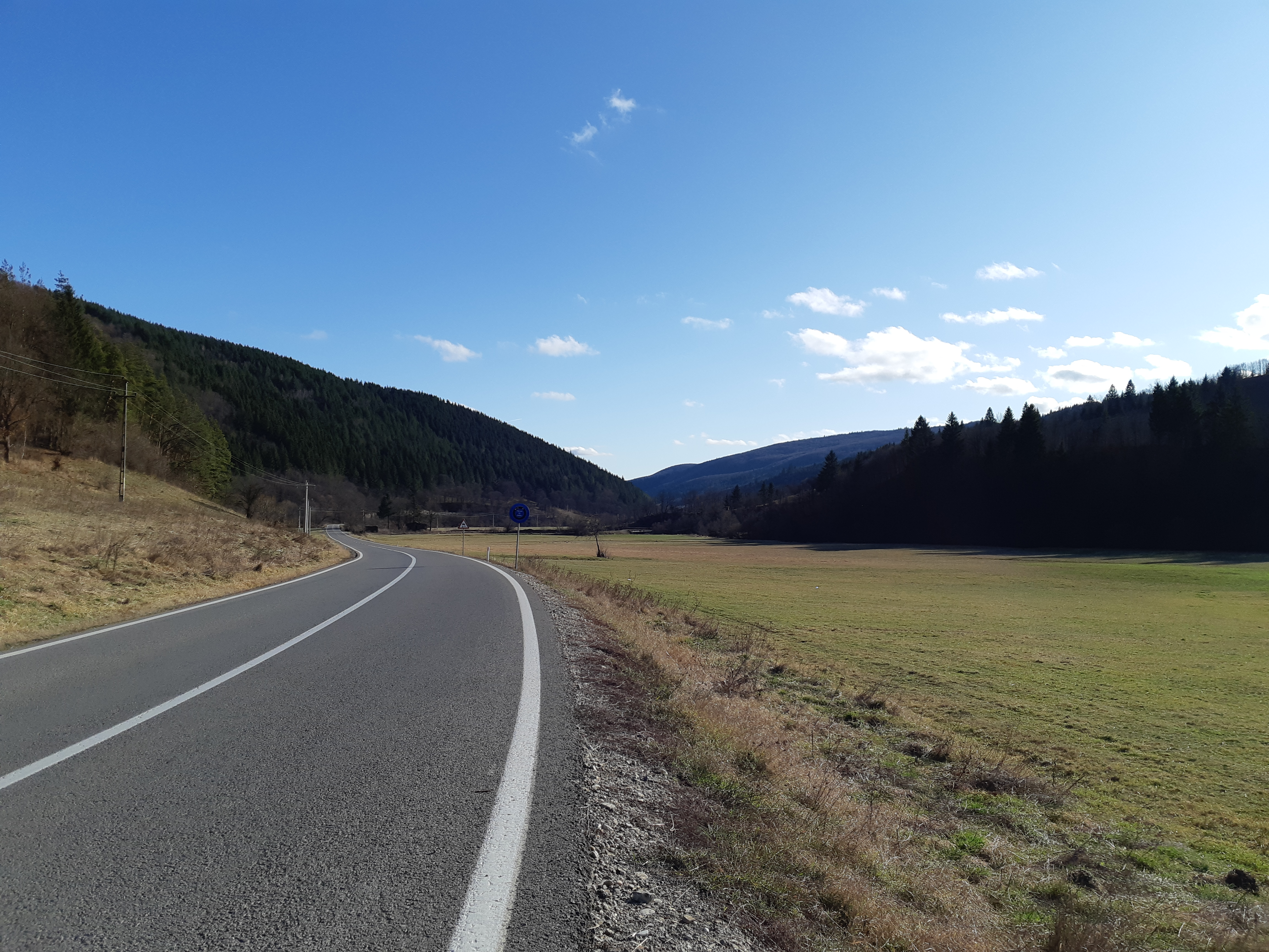 Valea Caşinului transilvănean (afluent al Râului Negru): la nord de Cătruşa la limita dintre judeţele Harghita şi Covasna, cu obiectivul spre sud.